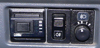 Umschalter Autogas-Benzin